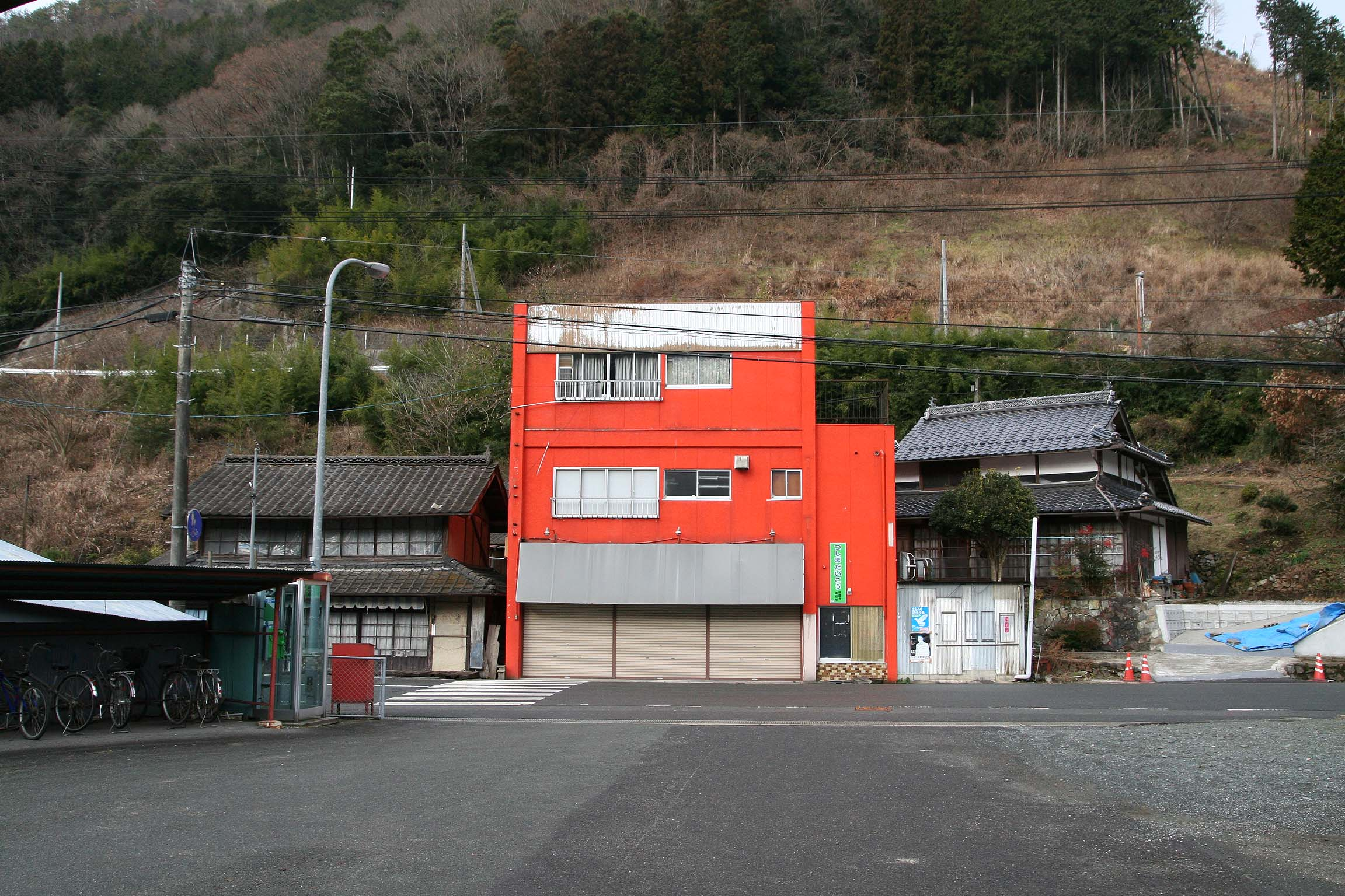 岩山駅周辺の様子